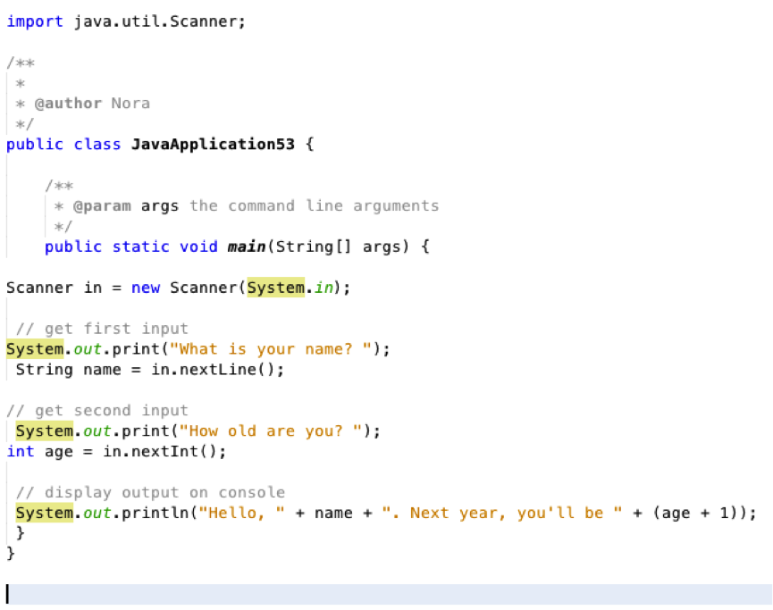 الكود